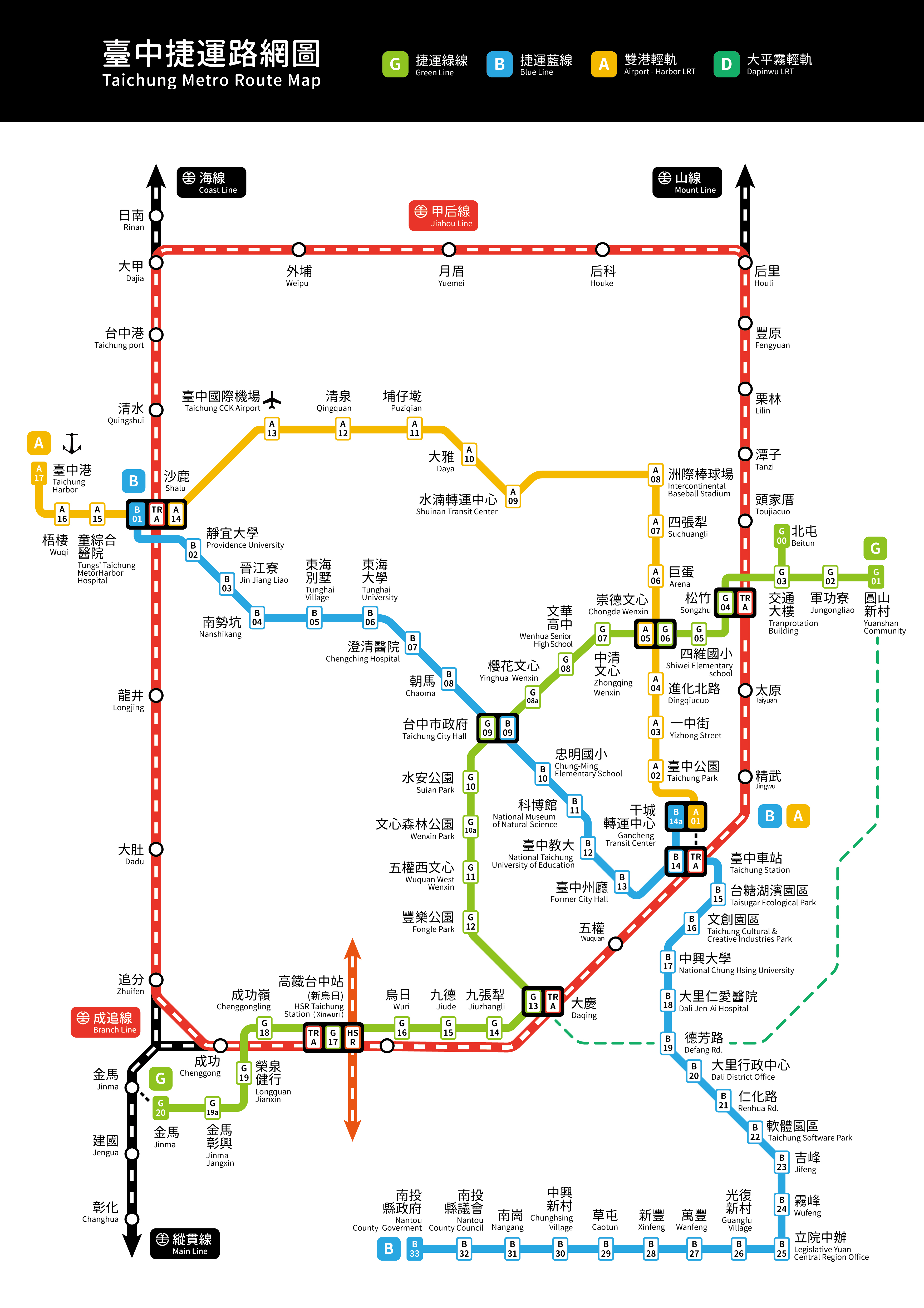 中文（台灣）: 2018.01 台中捷運路網